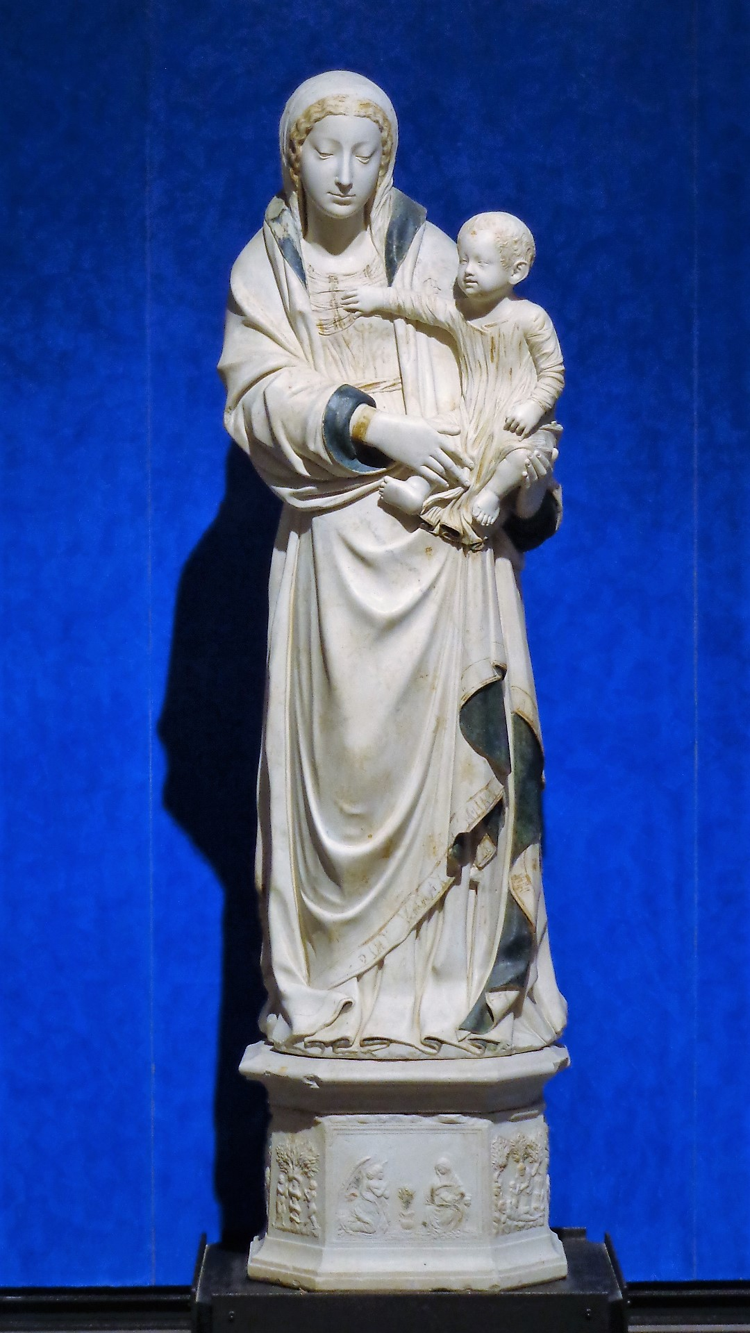 Madonna con Bambino di Francesco Laurana, proveniente dalla chiesa di Sant'Agostino, custodita nel Museo regionale di Messina